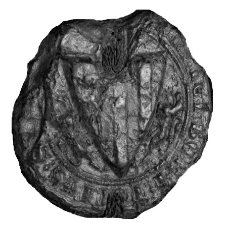 Kőszegi Henrik szlavón bán pecsétje, 1273